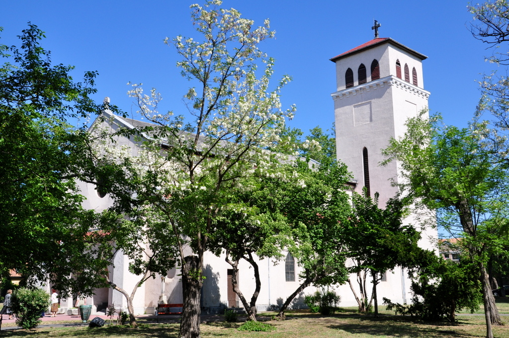 Roman Catholic church in Pestújhely